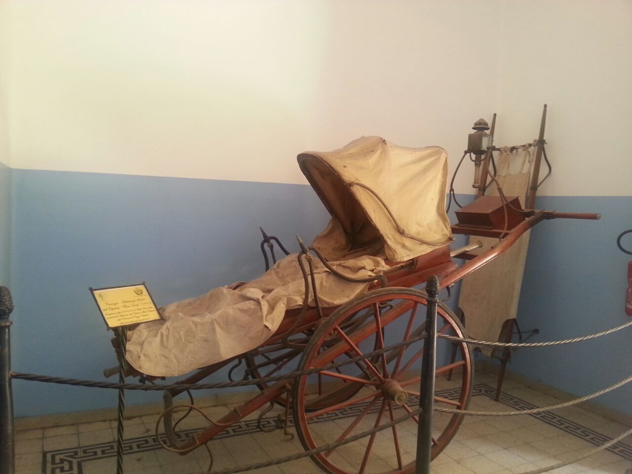 Carrozza Ambulanza, Melito di Porto Salvo